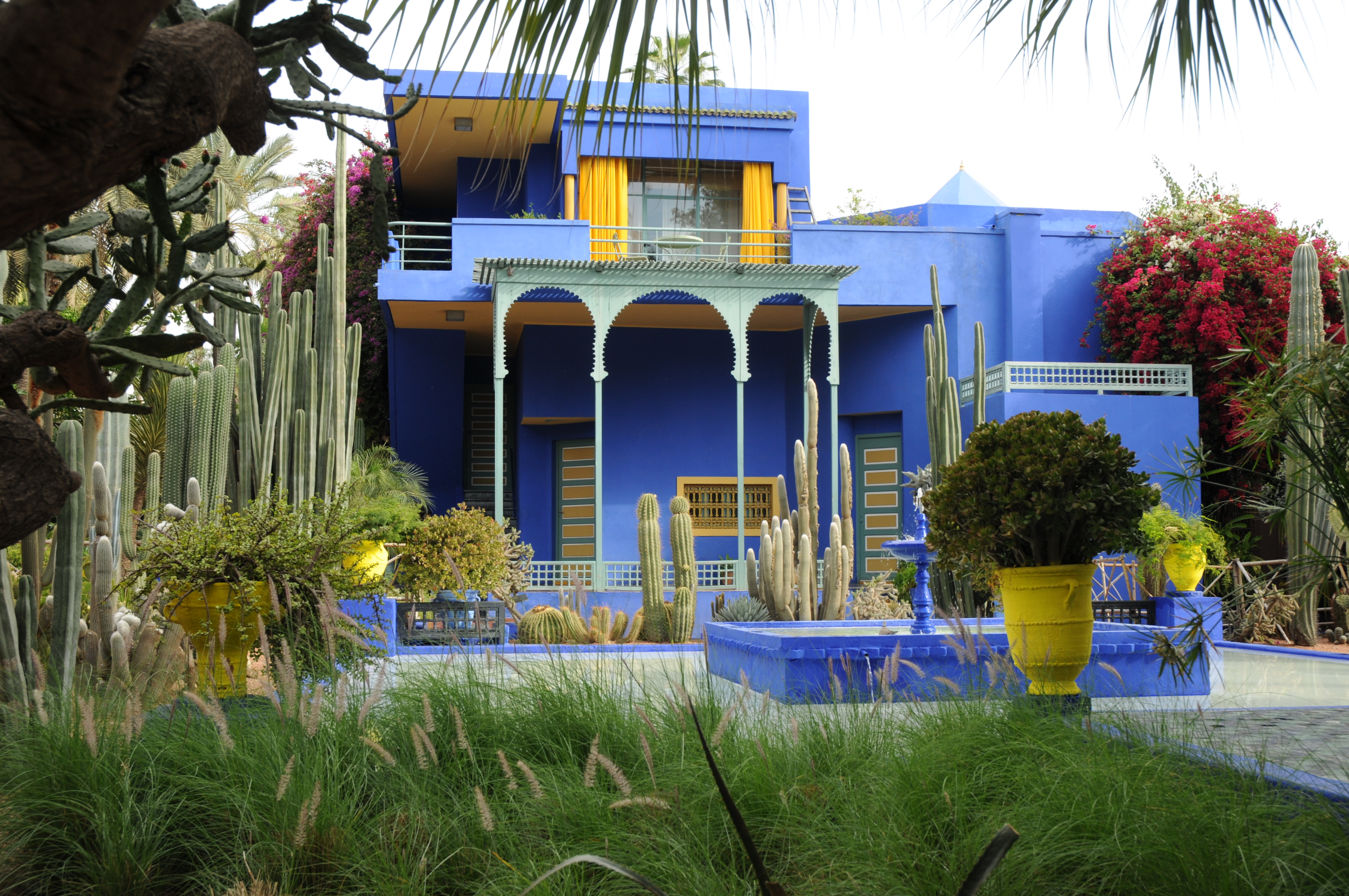 Le_jardin_des_majorelle_20.JPG Marrakech maros